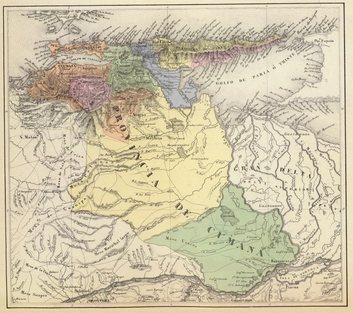 Provincia de Cumaná. Tomado del "Atlas físico y político de la República de Venezuela", 1840.